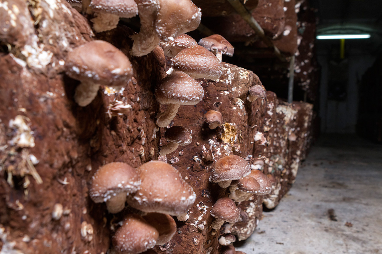 Cultivo de shiitake (Lentinula edodes) en Pradejón (La Rioja), localidad líder en el cultivo de champiñón y setas en España.